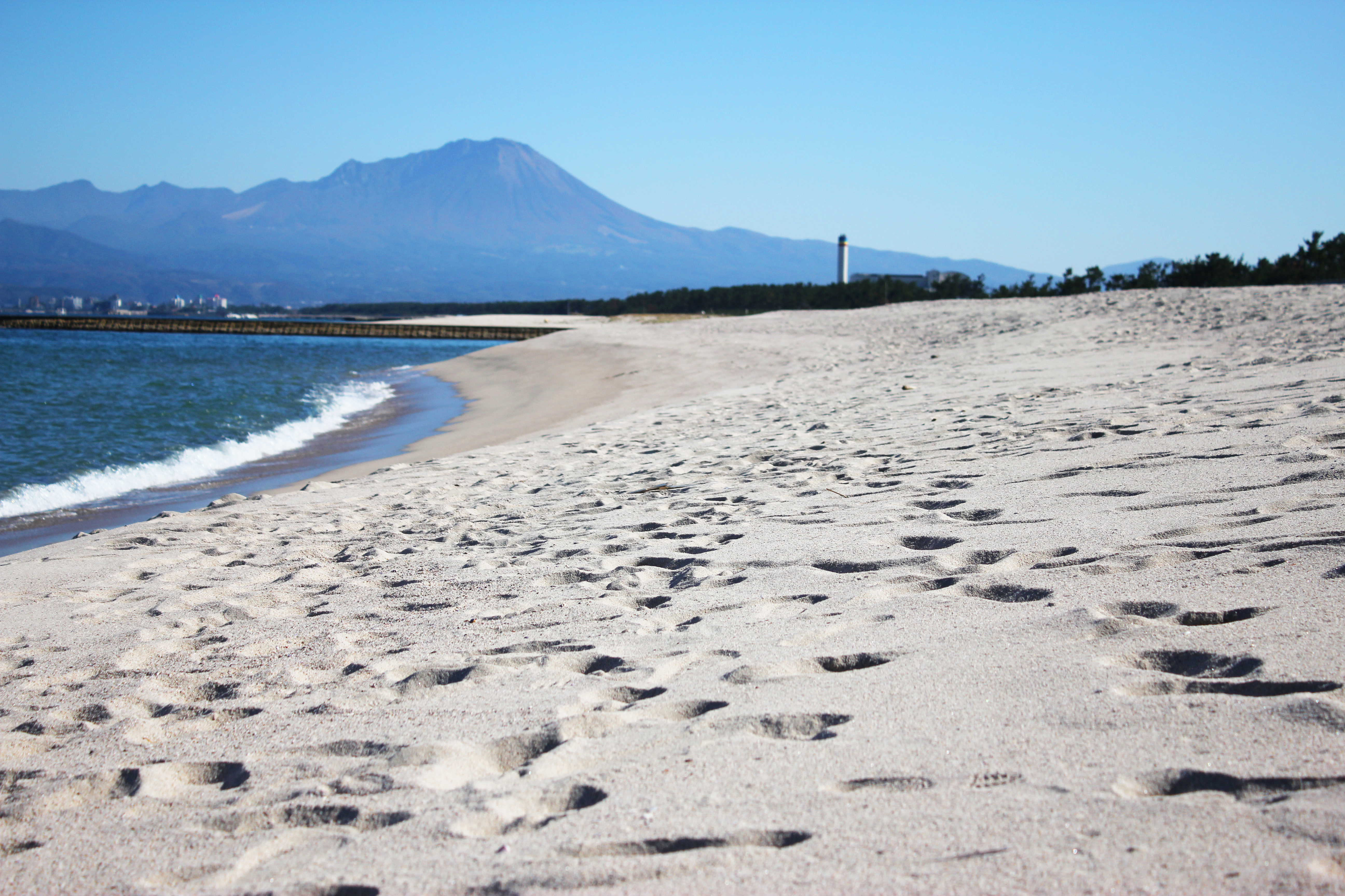 弓ヶ浜海岸と大山遠景